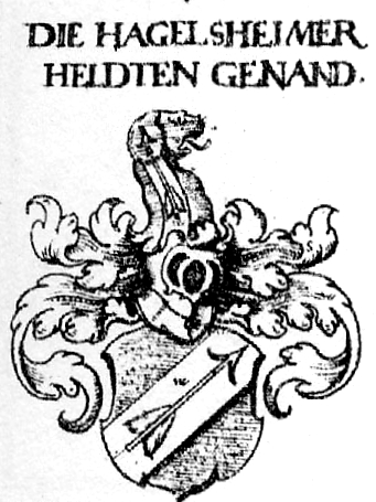 Wappen derer Held genannt Hagelsheimer / Hagelsheimer genannt Held, Nürnberger ehrbares Geschlecht (vgl. Johann Siebmachers Wappenbuch von 1605, Tafel 212: Die Helden.), dann adliges Nürnberger Geschlecht, dessen Wappen 1589 von Kaiser Rudolf II. auch einer schlesischen Familie Held zuerkannt wurde, die sich folgend Held von Hagelsheim nannte, und 1759 vom preußischen König Adelsrenovations- und Ritterstandsdipom mit diesem Namen erhielt.